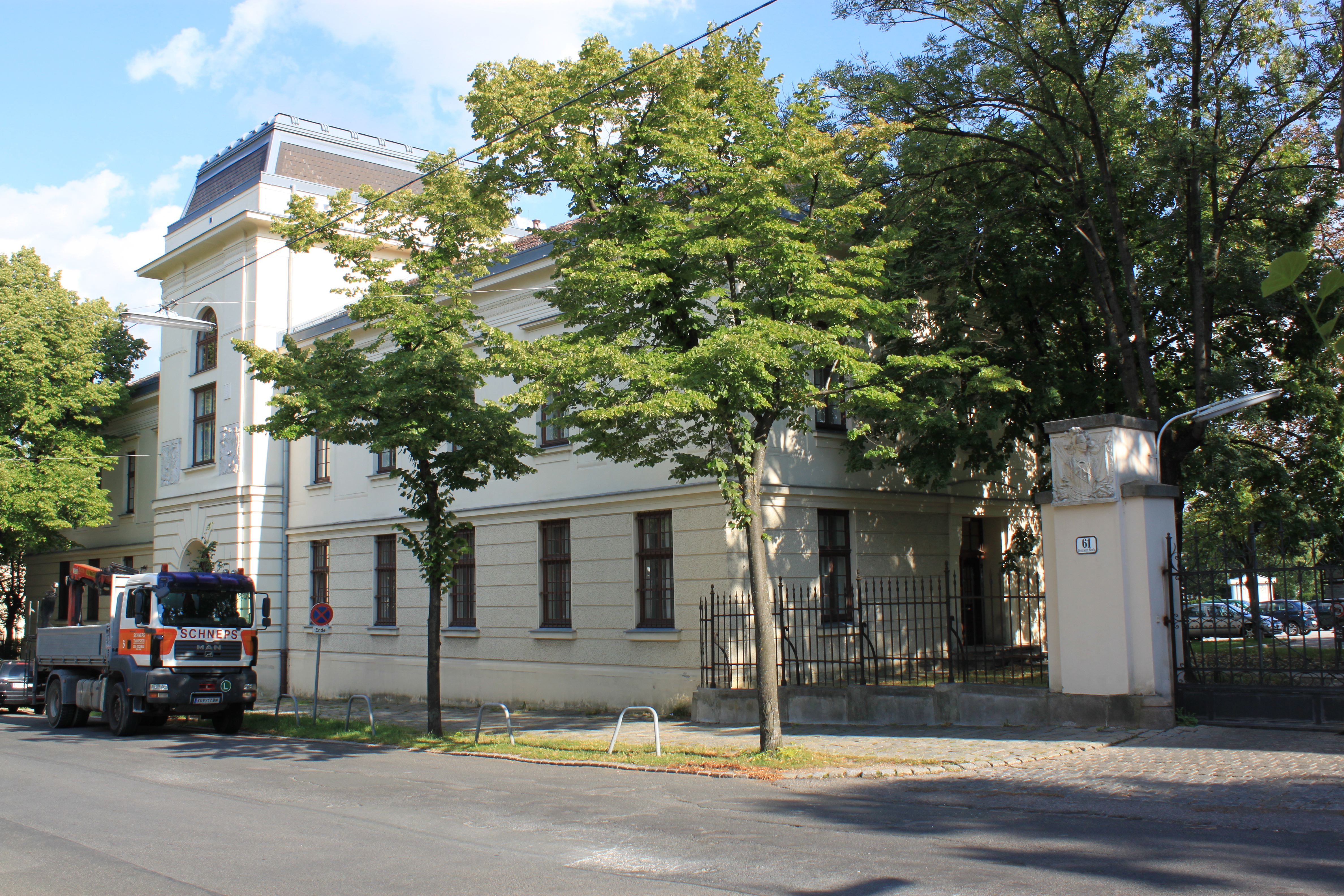 Vega-Payer-Weyprecht-Kaserne, Breitenseer Straße 61, 1140 Wien